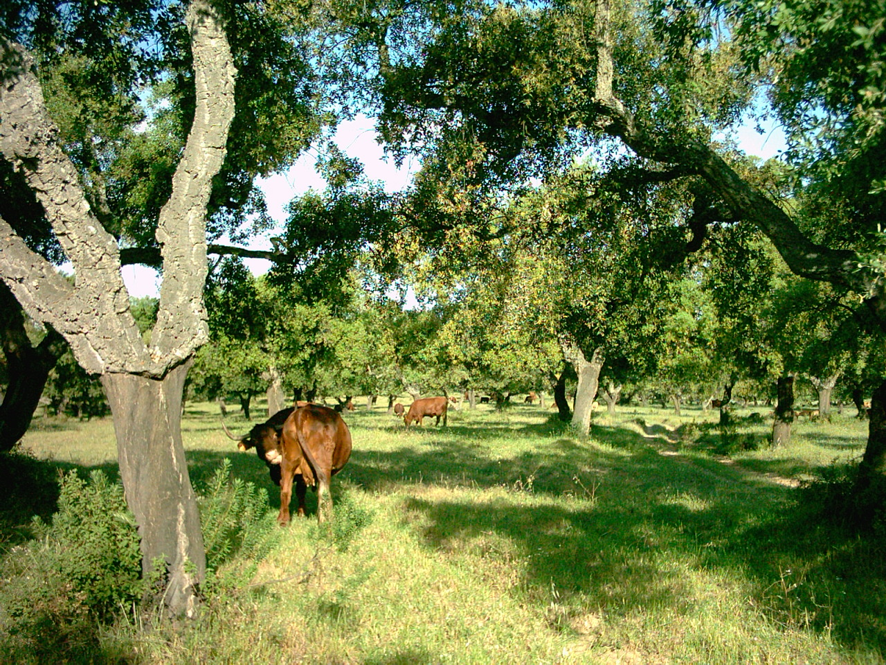 Imagen de una Dehesa en Bollullos Par del Condado (Huelva) Dehesa Boyal, en Bollullos Par del Condado (Huelva, España)